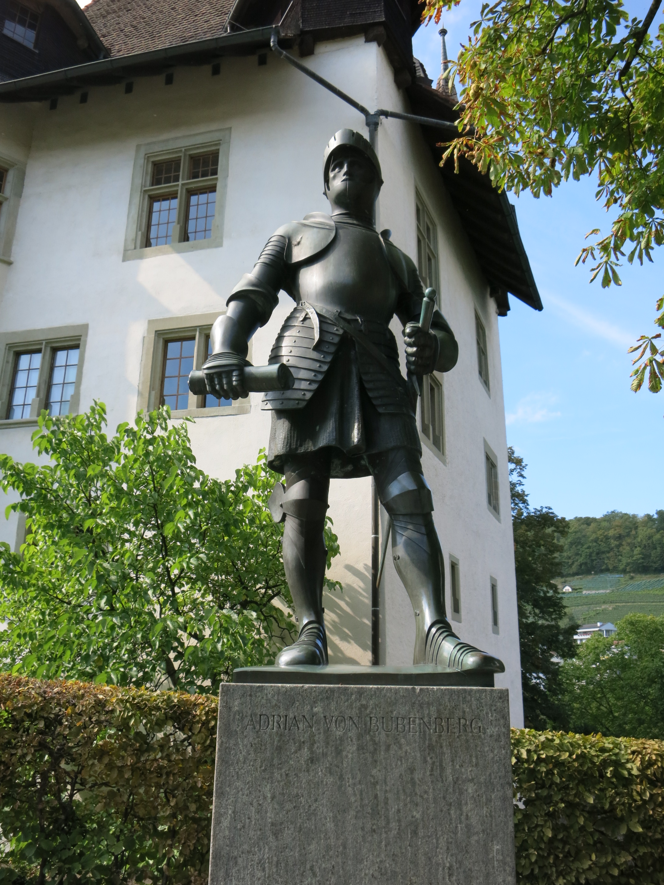 Schloss Spiez BE, Schweiz